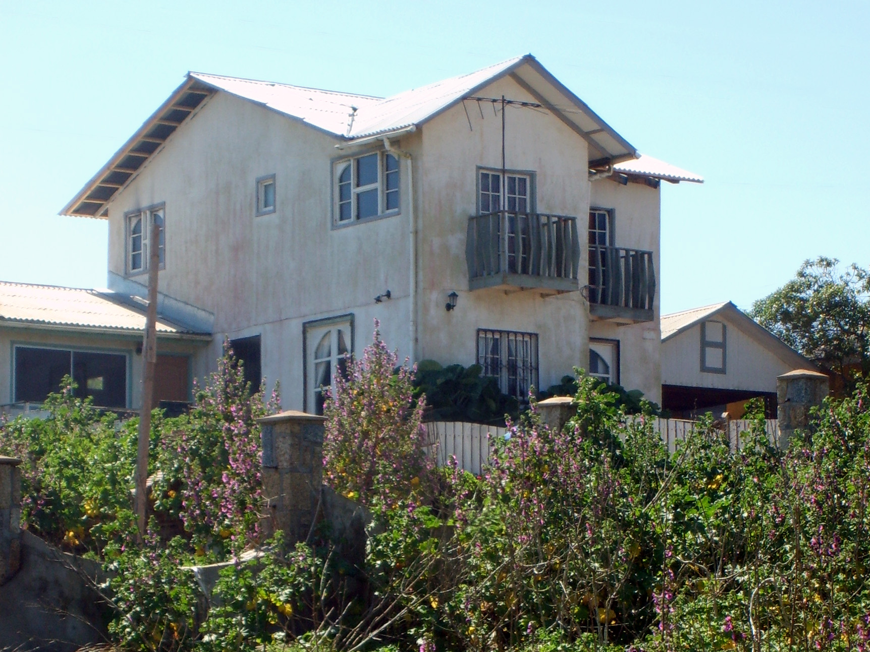 Casa del martillero público Jaime Oliva, asesinado por el fundador de la Universidad Santo Tomás, Gerardo Rocha, el 22 de febrero de 2008. Calle Neptuno #341, El Quisco, Chile. Según el programa Enigma, de TVN, Rocha contrató los servicios de Dante Yutronic, dueño de la tienda especializada "La casa del espí­a", para que realizara seguimientos a Oliva e, incluso, interviniera sus llamadas telefónicas. Los celos enfermizos de Rocha lo llevaron a elaborar un plan para vengarse de Oliva por un supuesto abuso sexual que su pareja, la sicóloga Verónica Espinoza, habí­a sufrido años atrás por parte de él. Con la ayuda de dos hombres, Rocha ingresó a la vivienda de Oliva en la comuna de El Quisco, lo encañonó, lo maniató con cinta adhesiva y le aplicó una descarga eléctrica que lo dejó inconsciente sobre la cama de una de las habitaciones. Posteriormente, lo roció con bencina y le aplicó una segunda descarga, cuya chispa provocó una esplosión en el segundo piso de la casa. Aunque Rocha resultó con más del 40% de su cuerpo quemado, logró salir de la vivienda por sus propios medios para esconderse durante algunos minutos en un sitio eriazo cercano a la casa. Junto con sus ayudantes, Rocha pudo llegar a la Clí­nica de Reñaca. Horas más tarde, fue trasladado a la Clí­nica Indisa en Santiago. Tras dos meses agonizando inconsciente, Gerardo Rocha murió el 5 de mayo de 2008 a las 4:30 horas por una falla orgánica múltiple.